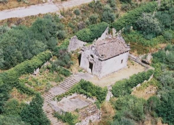 Capela de Sta. Umbelina em S. João de Tarouca